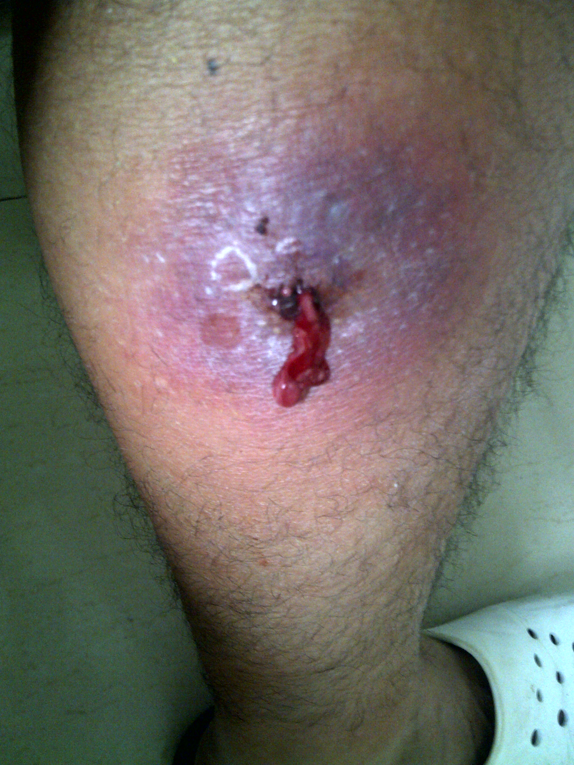 tercer dia del ciclo de la celulitis infecciosa